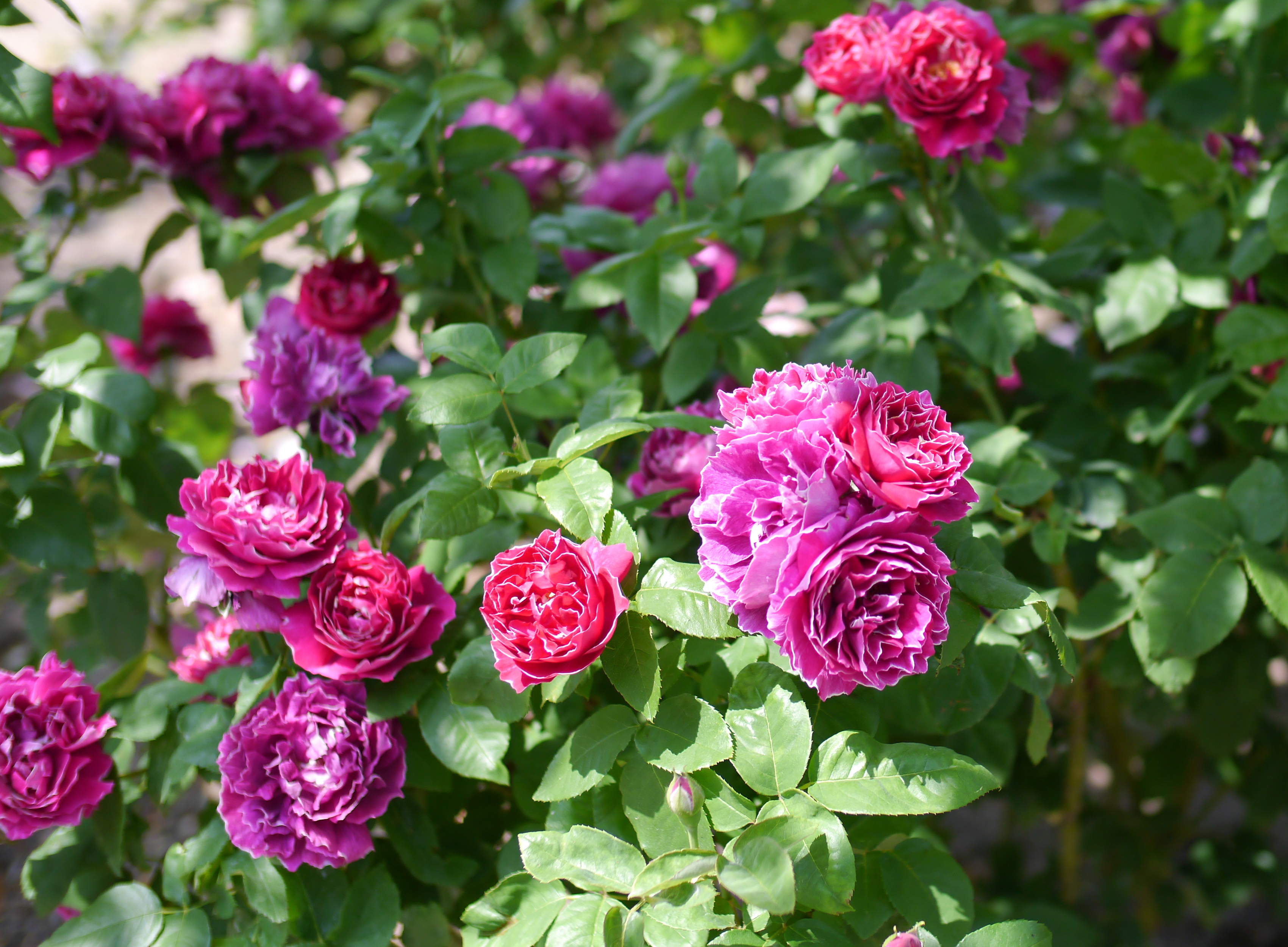 Rose, Baronne de Prailly, バラ, バロン ドゥ プライリ, Old rose(HP) オールドローズ France フランス Liabaud 1871